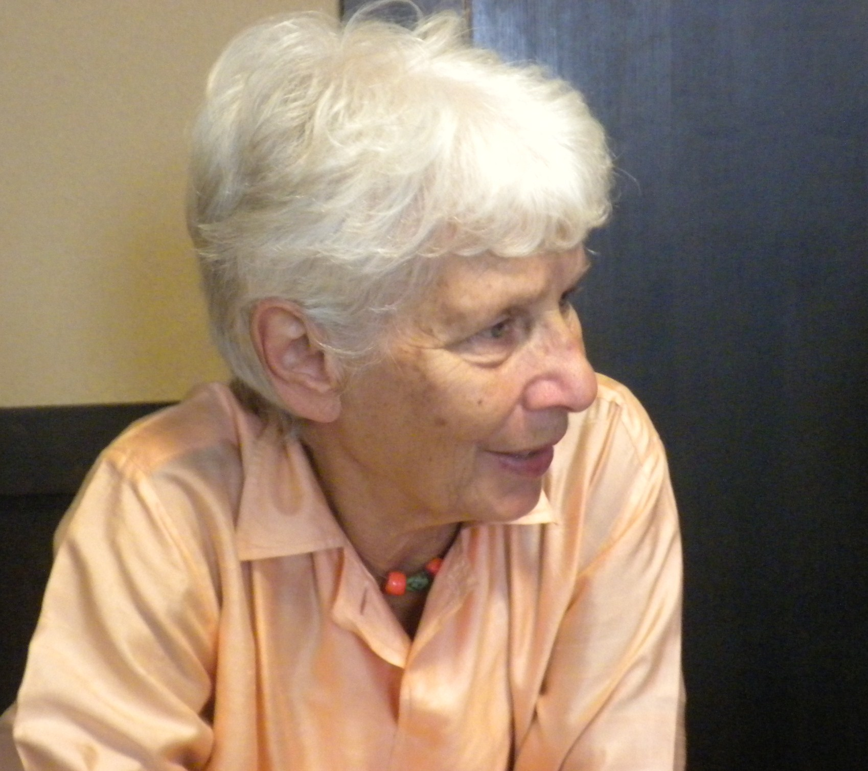 赤池・アム・アネローゼ